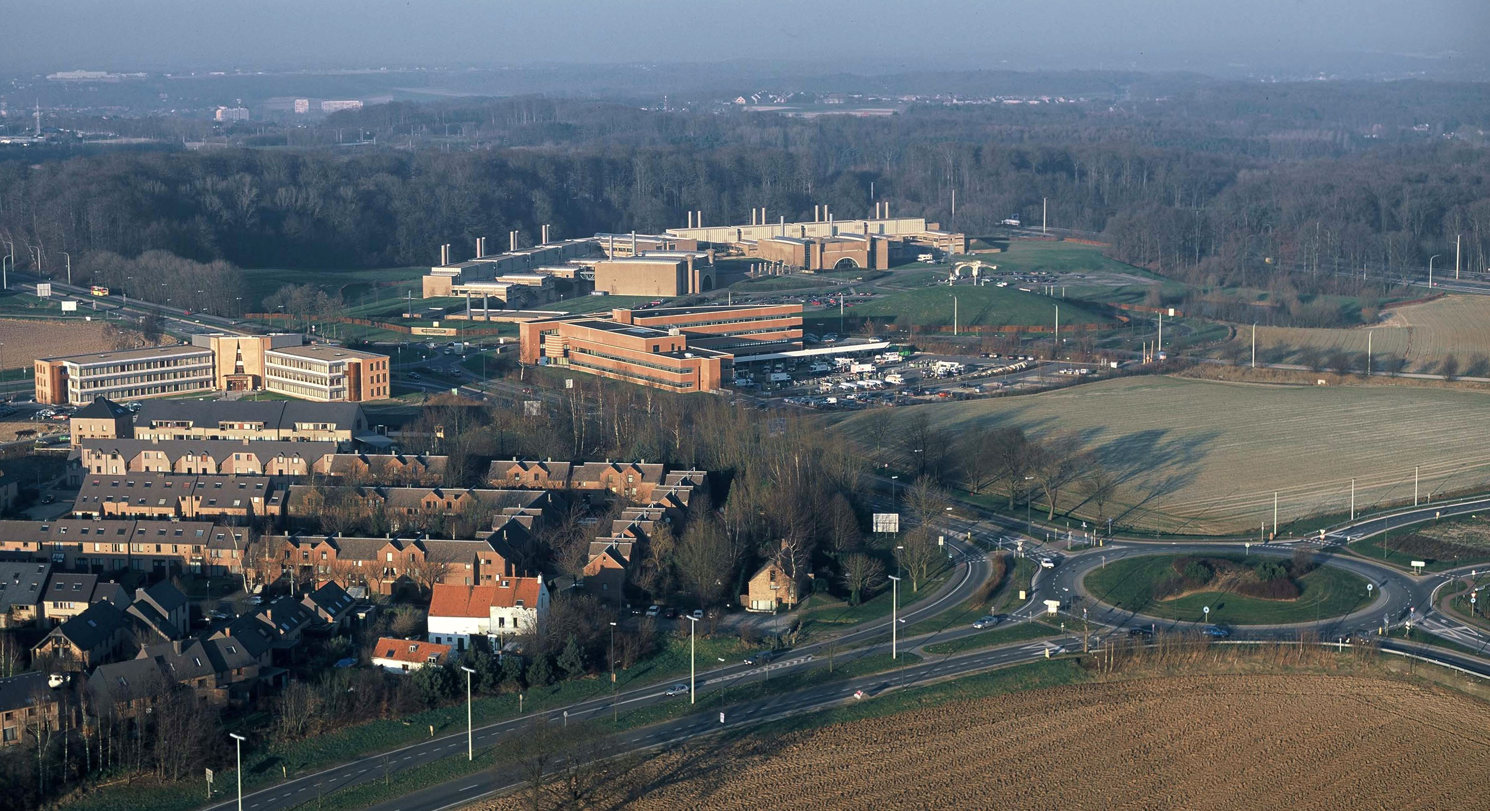 Sujet:Louvain-la-Neuve Science-Parc aus der Lof.